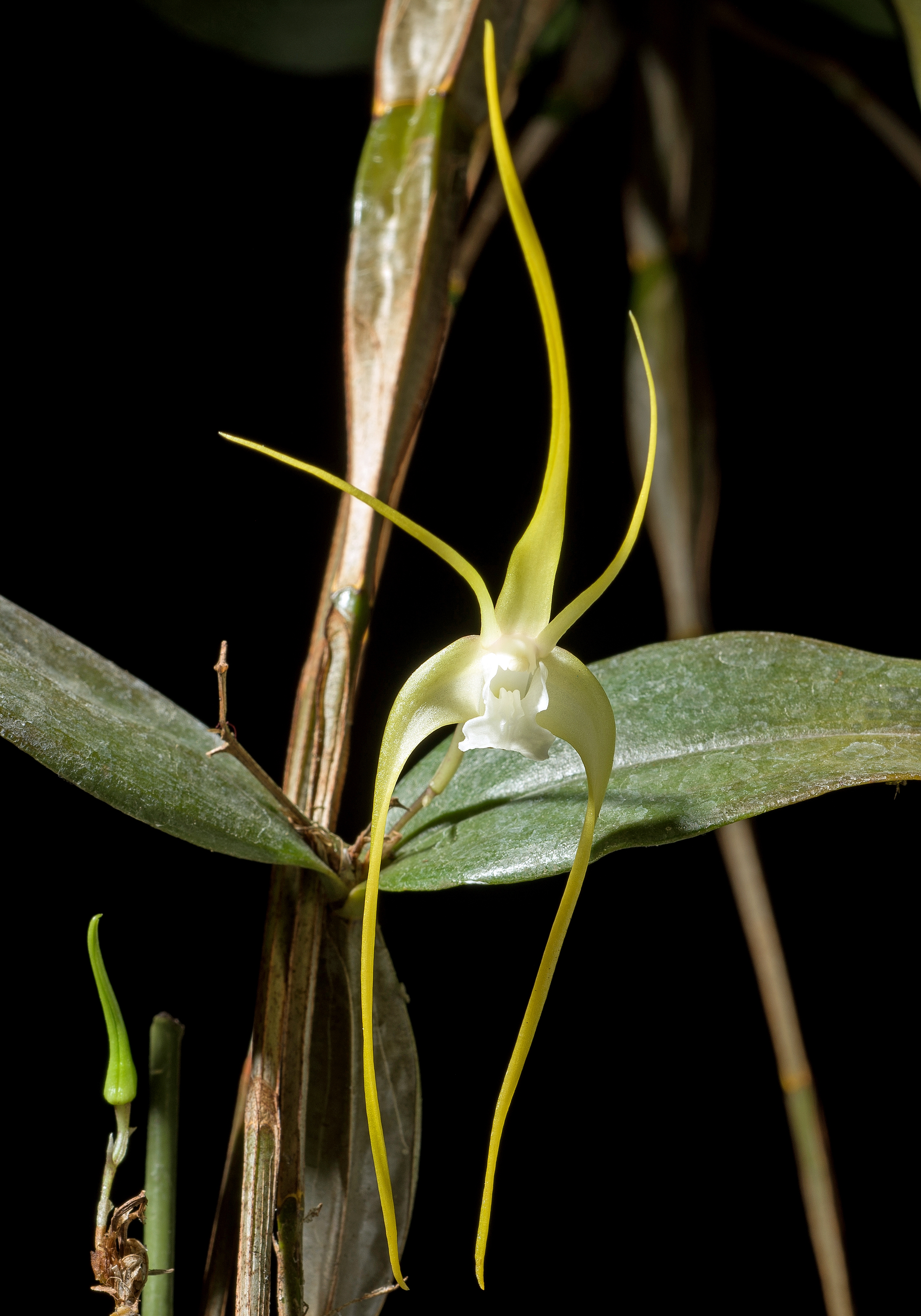 Dendrobium tetragonum